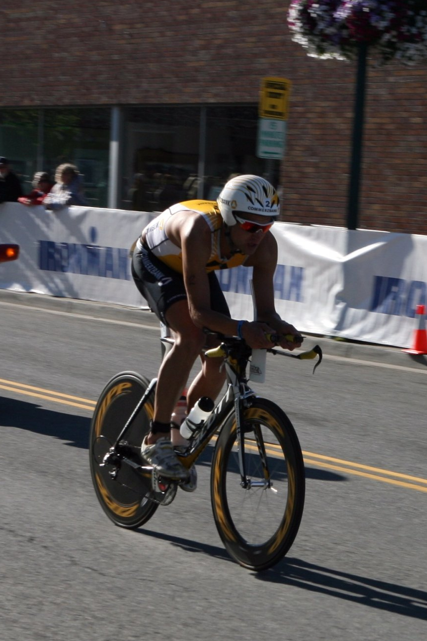 Maik Twelsiek Ironman Coeur d'Alene 2011